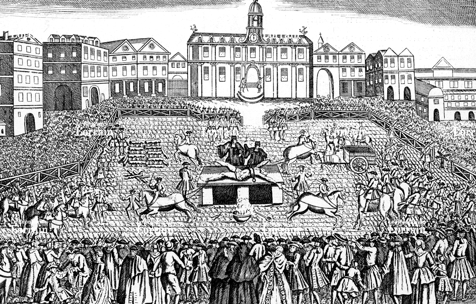 Supplice de Robert-François Damiens pour régicide sur la place de la Grève (actuelle place de l'Hôtel-de-Ville) à Paris le 28 mars 1757.